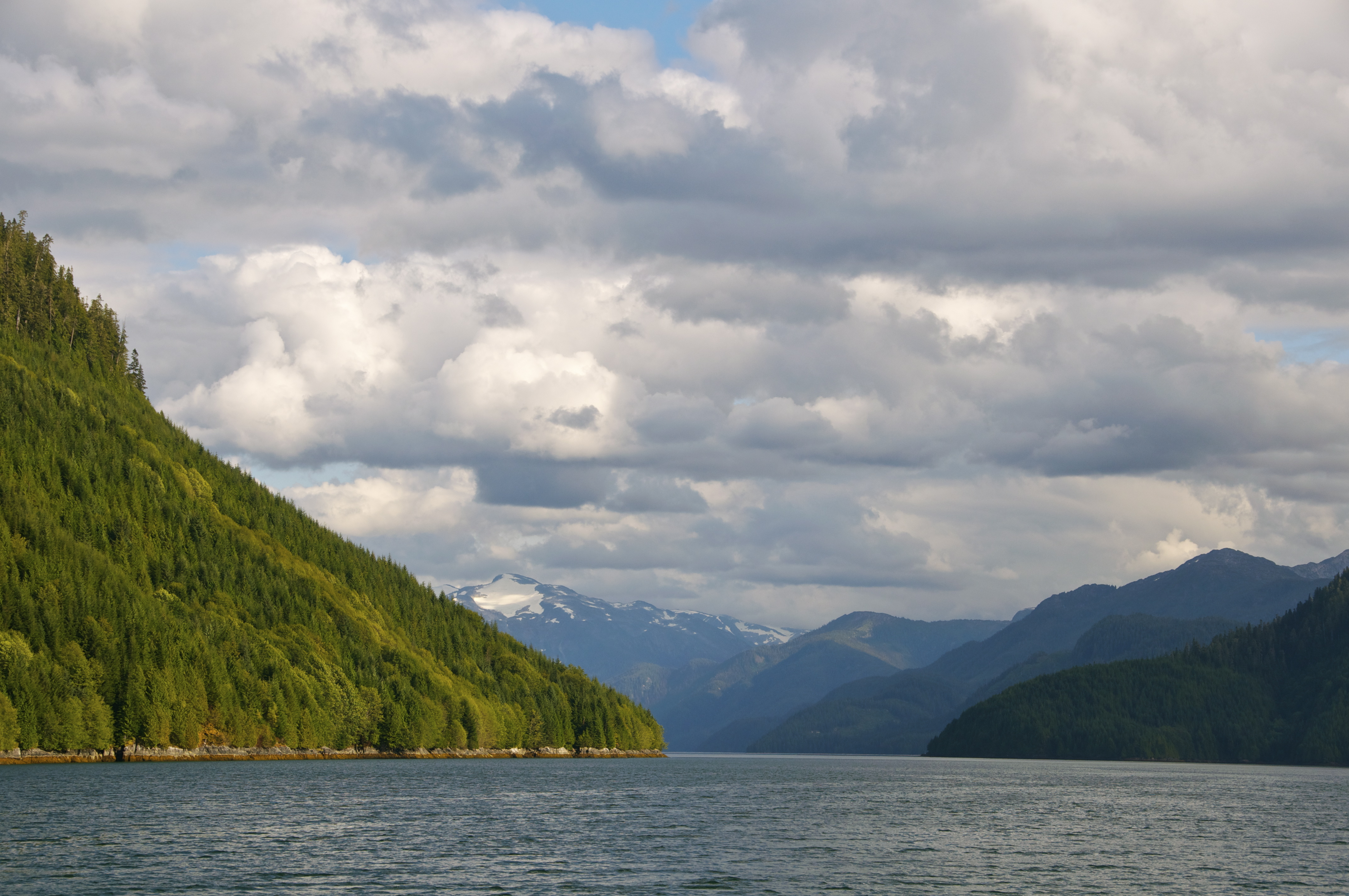 Day 2